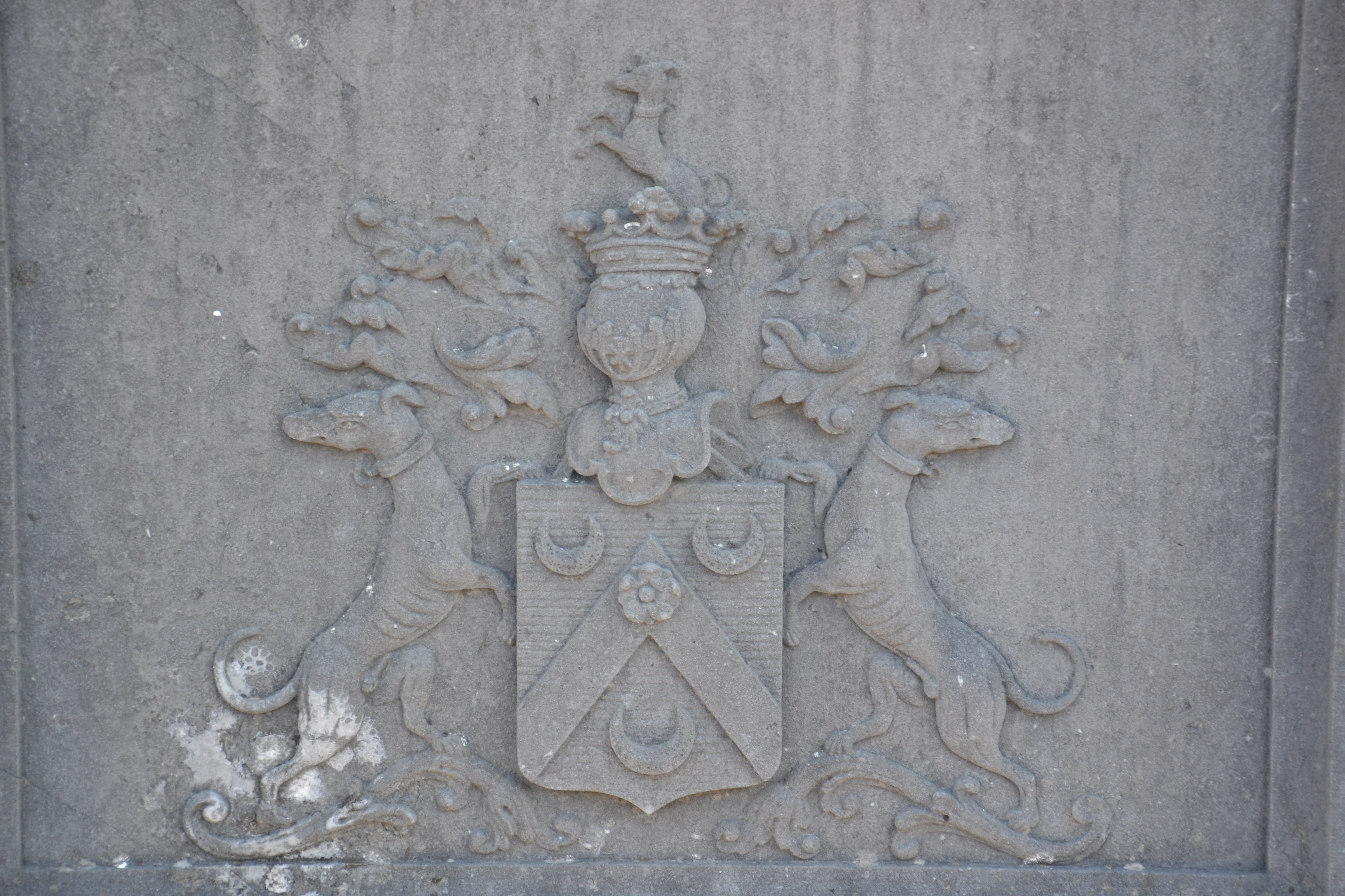 Armoiries de la famille de Burlet représentées sur un caveau de la famille de Burlet au cimetière de Nivelles.